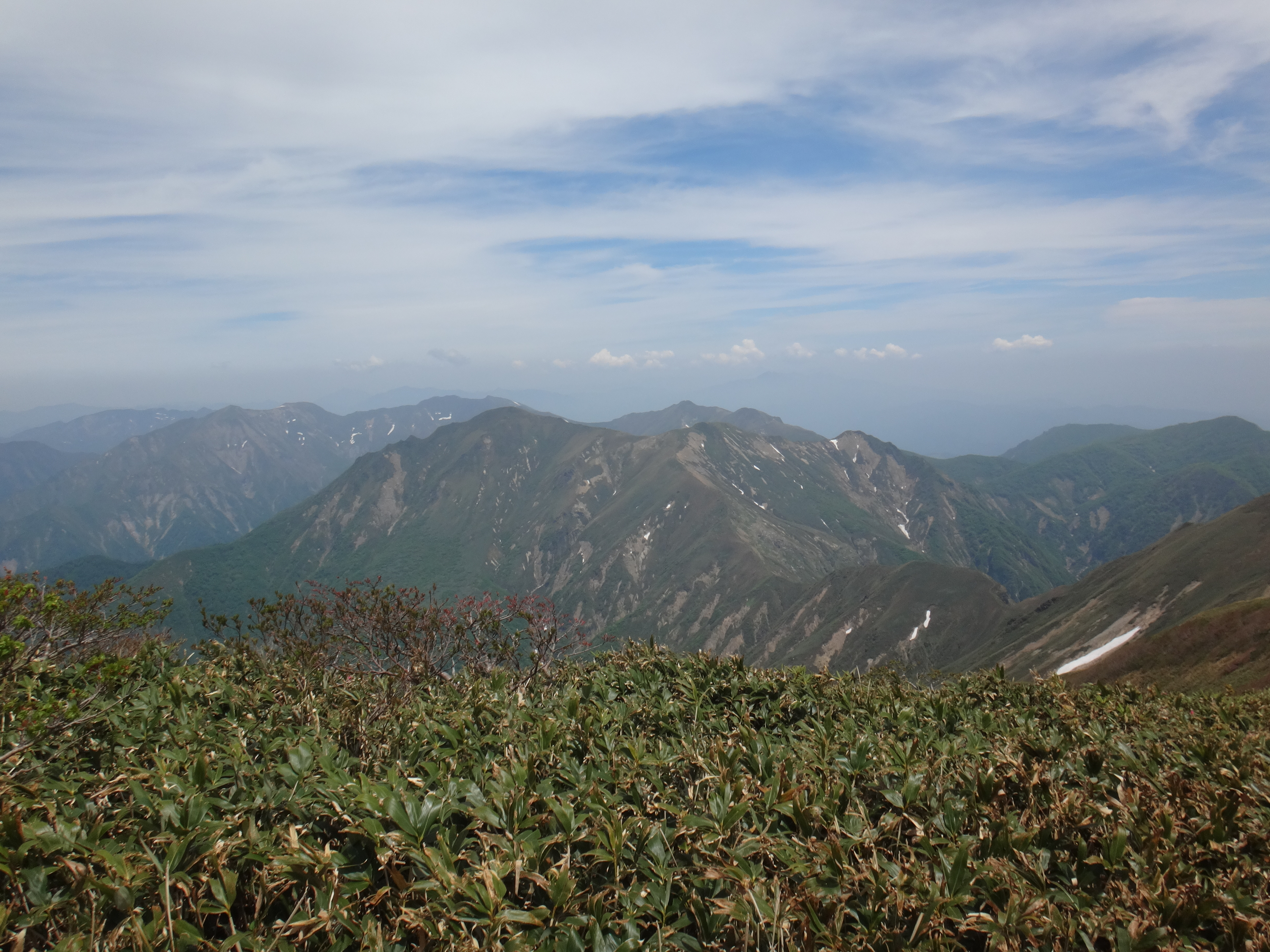 仙ノ倉山から見た万太郎山（奥は谷川岳）